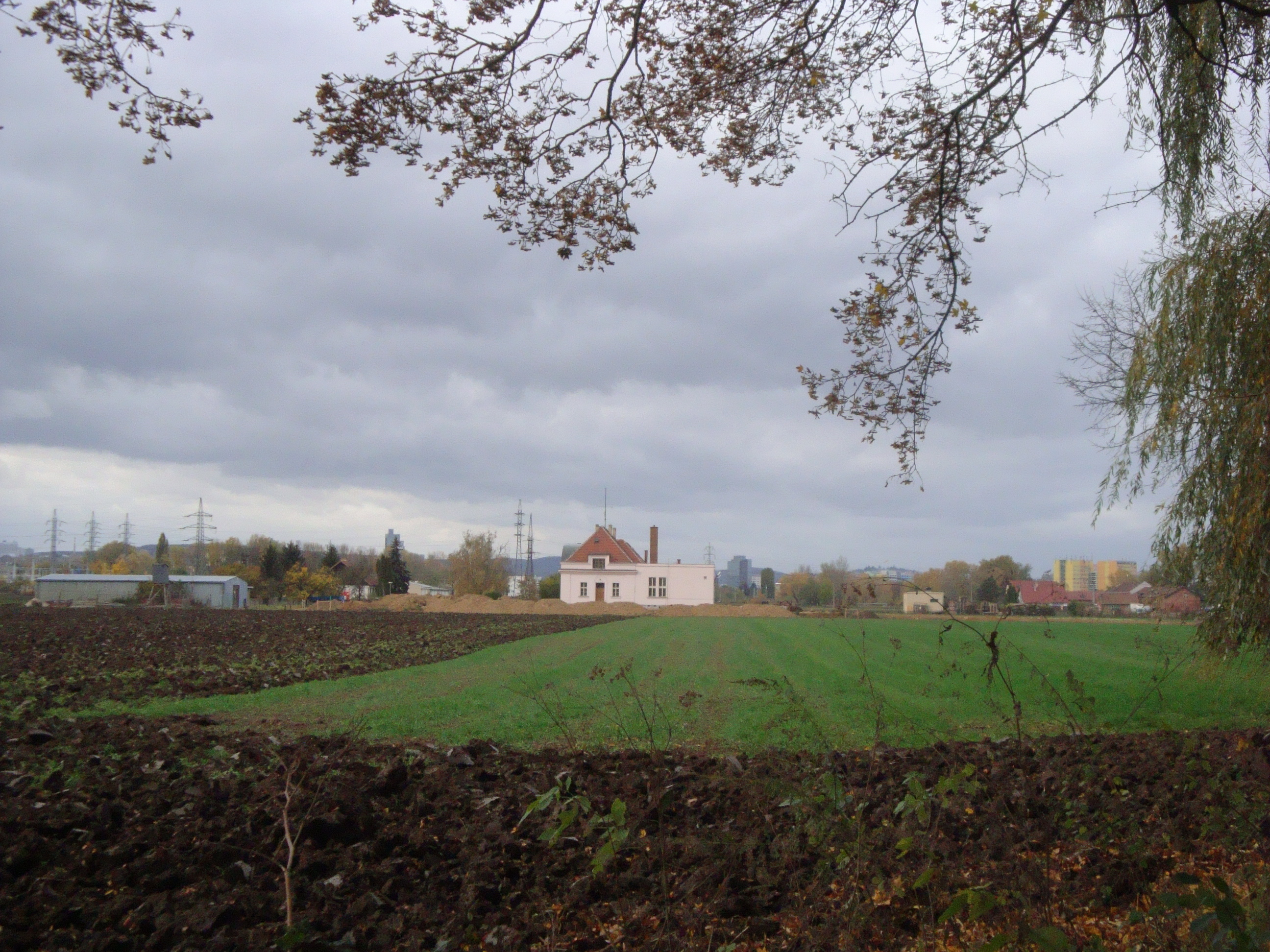 Pohled do okolí z hranice chráněného území, focenu v říjnu 2016